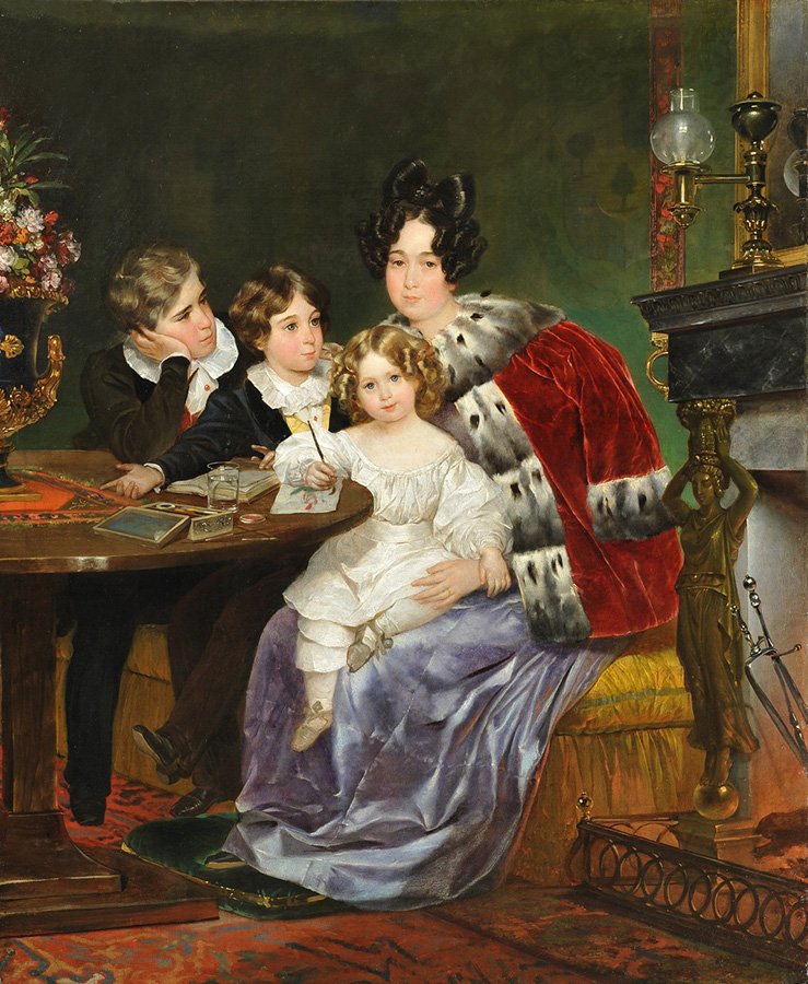 Портрет Екатерины Петровны Гагариной (1790-1873) с сыновьями Евгением, Львом и Феофилом.